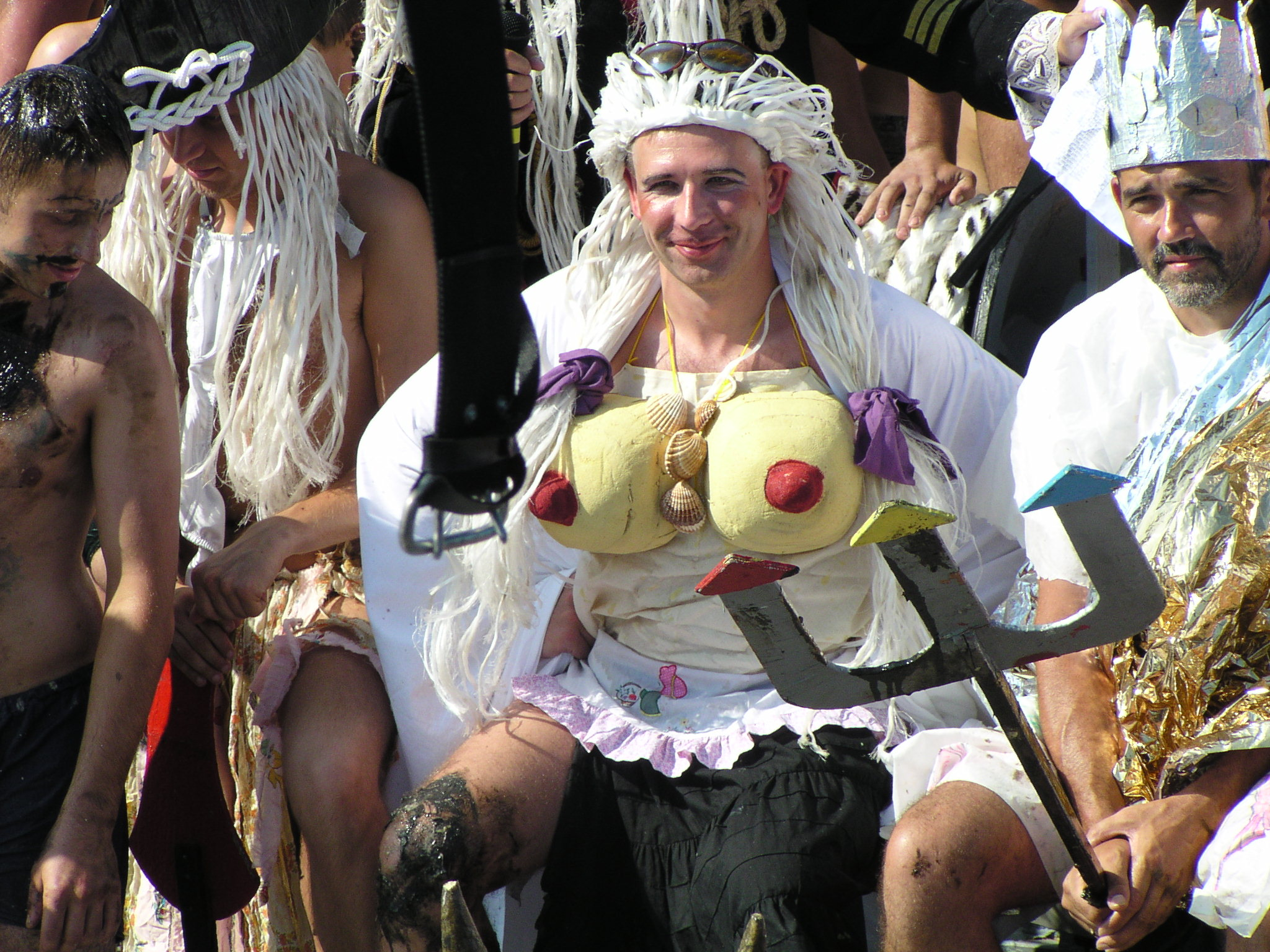 Chrzest morski na ORP Wodnik